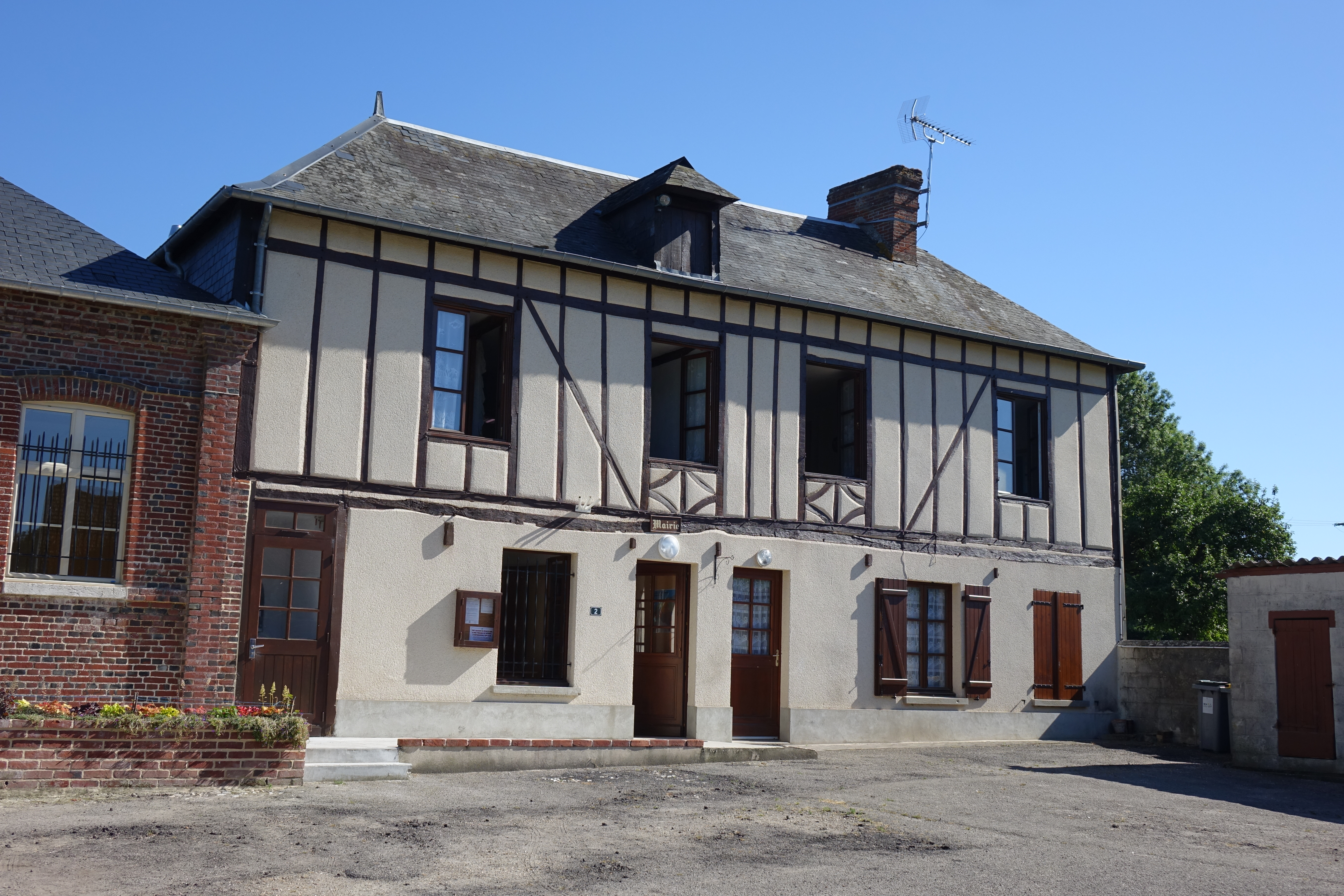 Mairie de Fry, Seine-Maritime, France